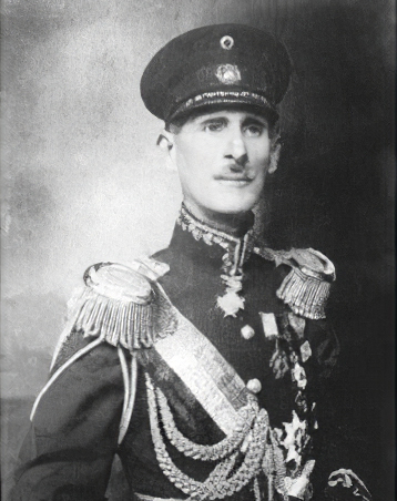 Portrait of Eleazar López Contreras